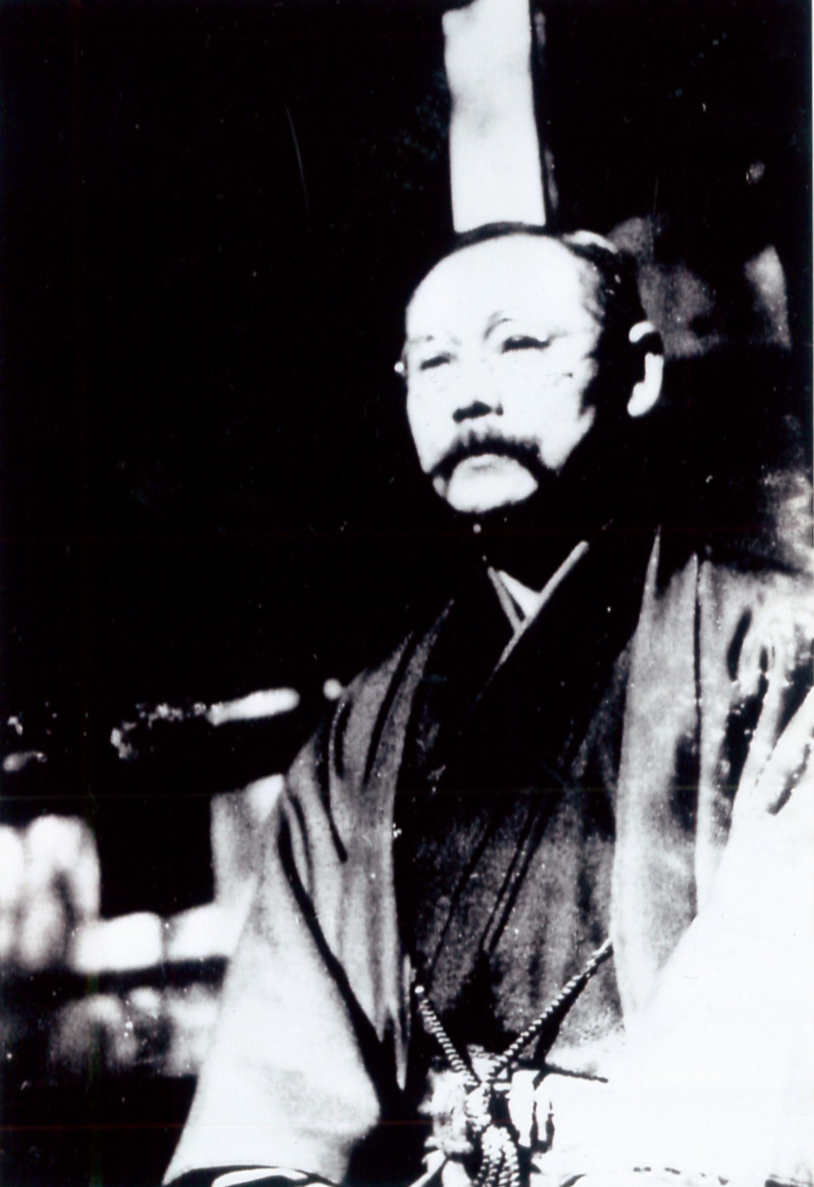 カイゼル鬚に和服姿の二木謙三